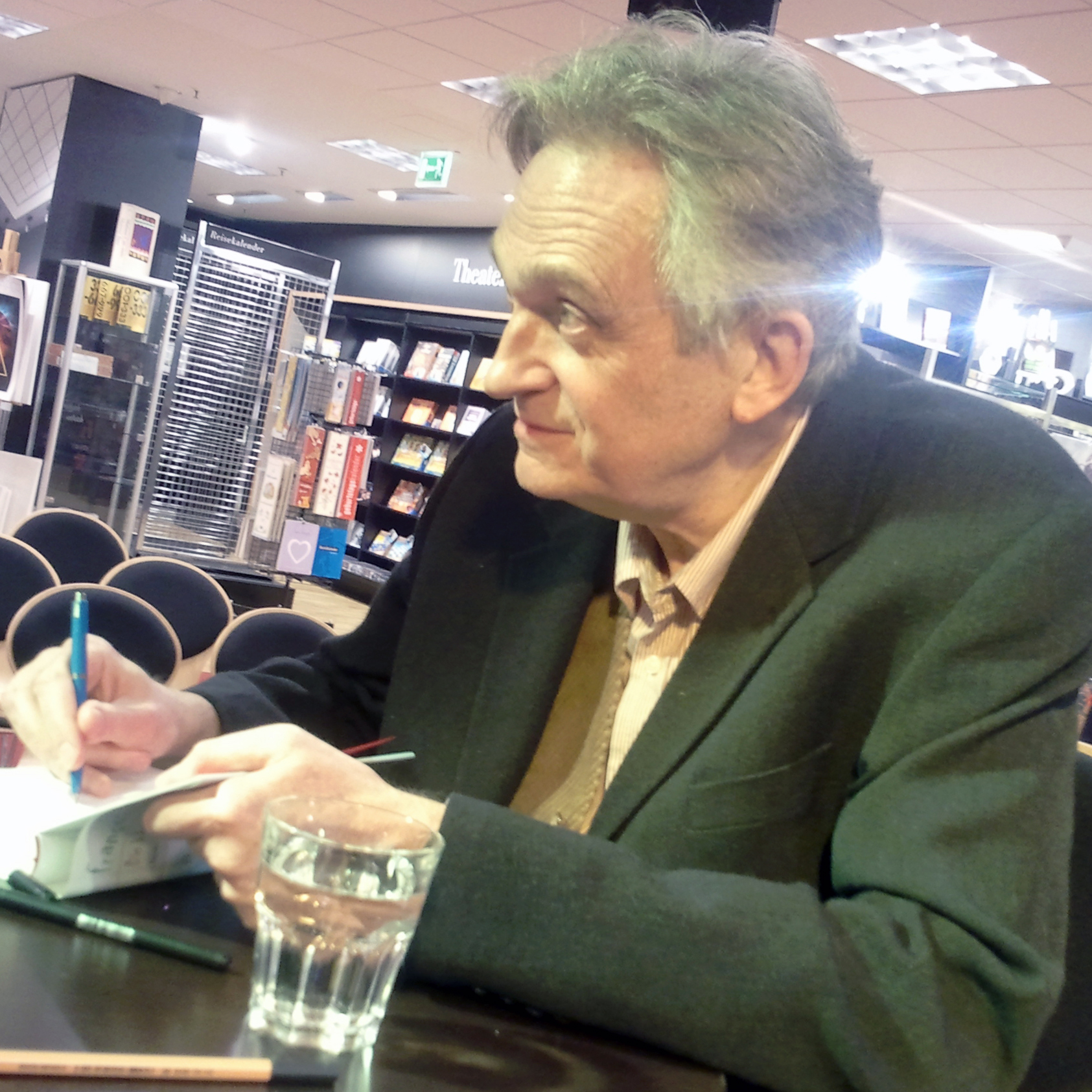 Autogrammstunde nach einer Lesung in Dortmund